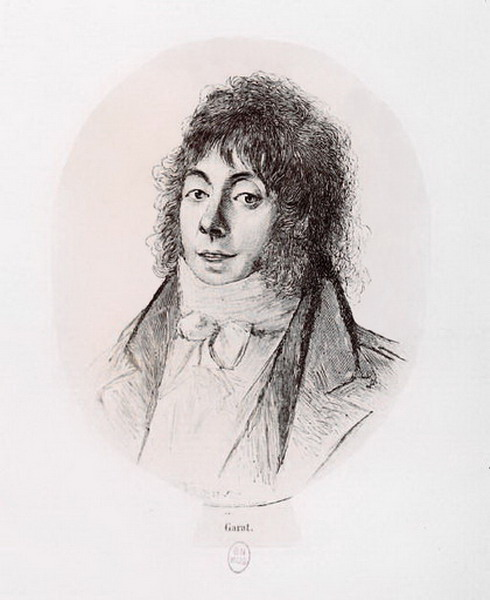 Pierre-Jean Garat en habit d'Incroyable.